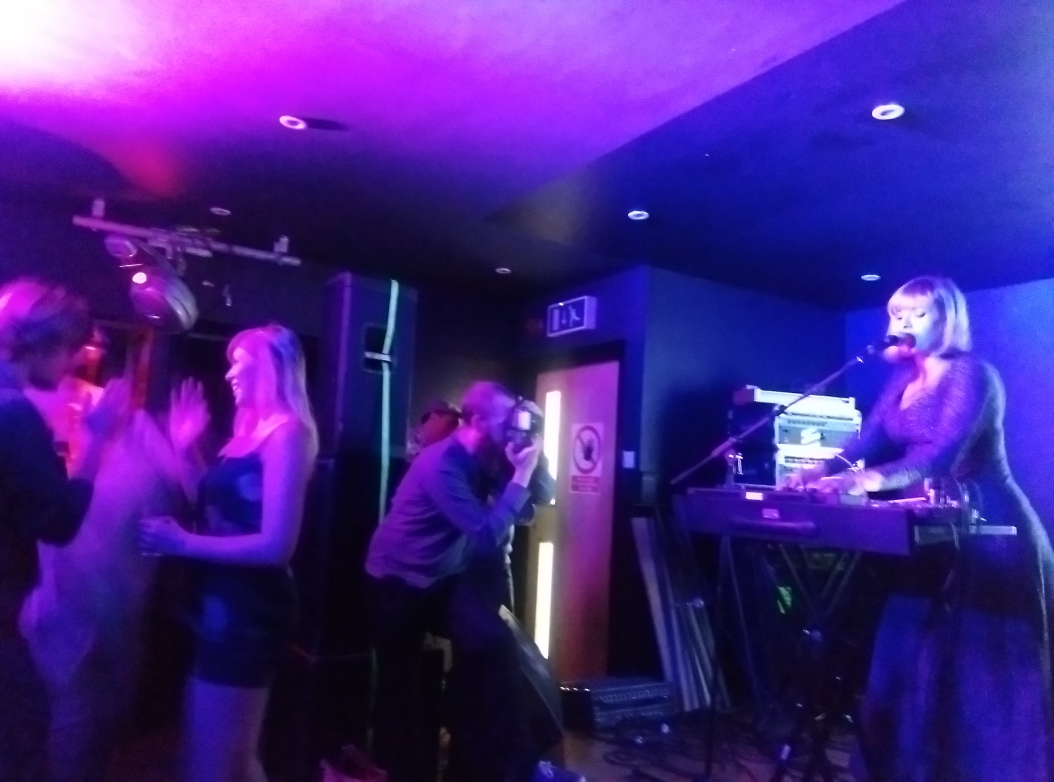 Gwenno yn tafarn y Parrot, Caerfyrddin